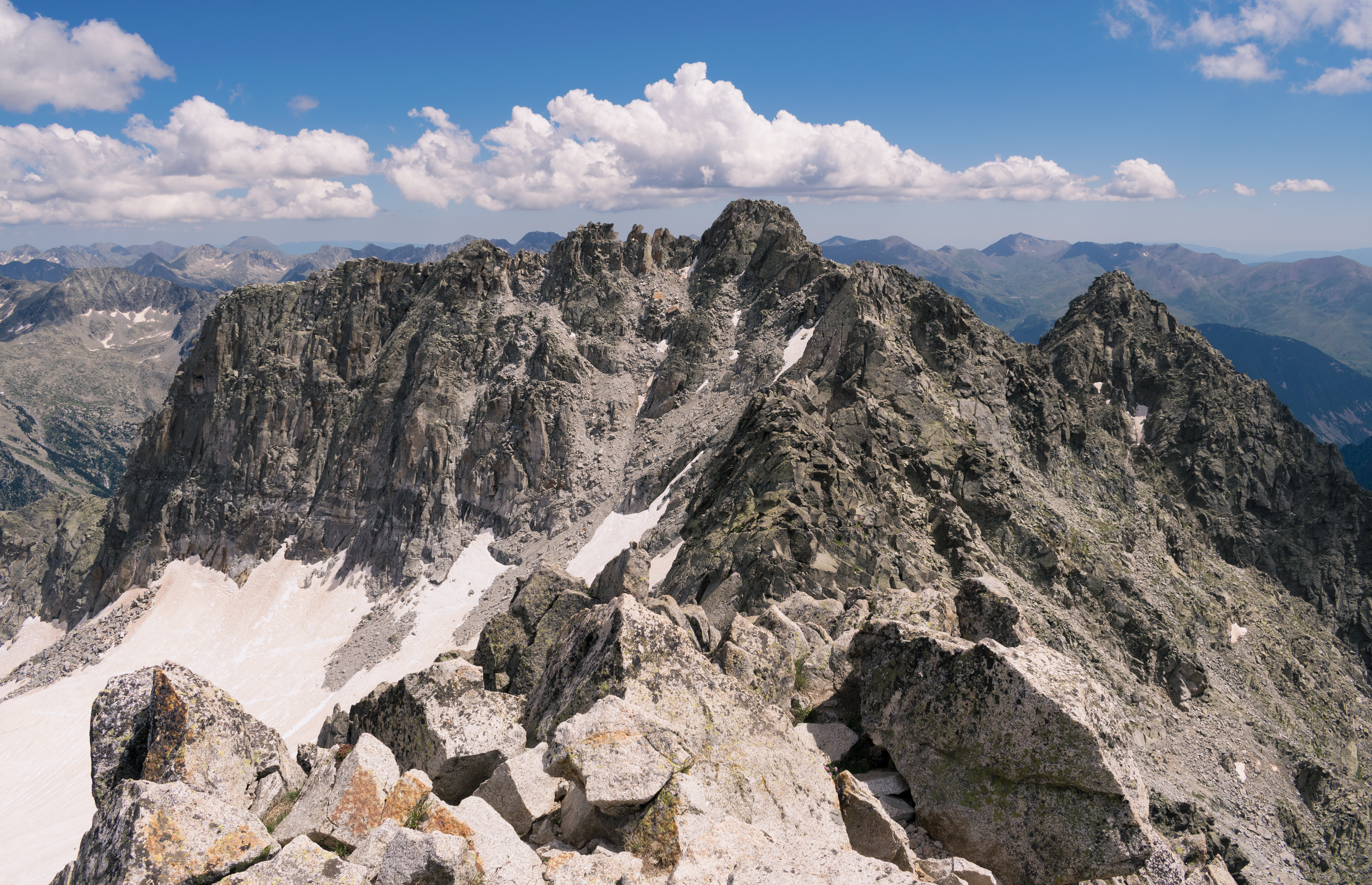 Comaloforno (3.033m) y su impresionante cresta desde la cima del Besiberri Sud (3.030m).